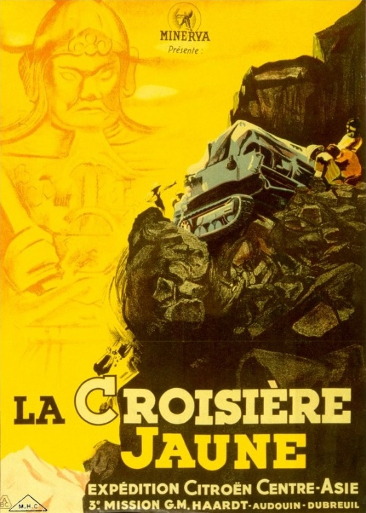 Affiche du film tiré de l'expédition Citroën Centre - Asie de 1931 - 1932. Film La Croisière Jaune, sorti en 1934.